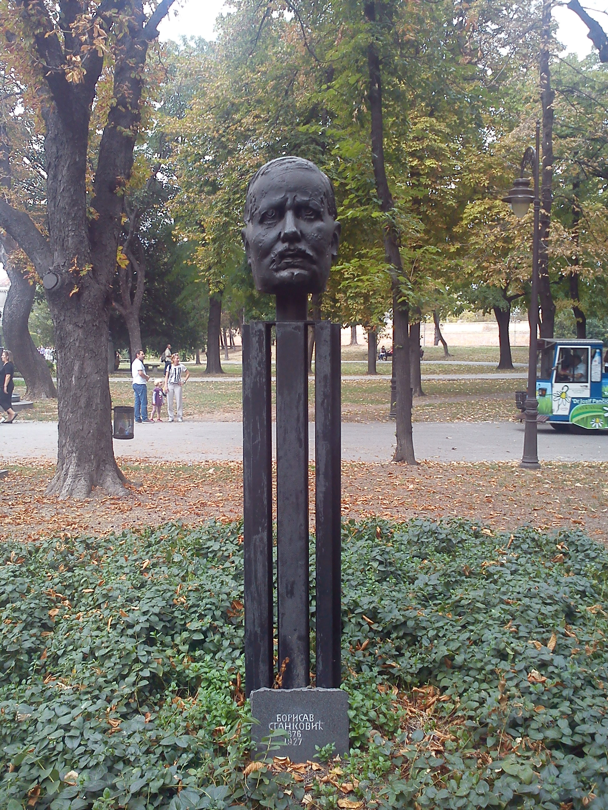 Borisav Bora Stanković, srpski pisac 1876 - 1927